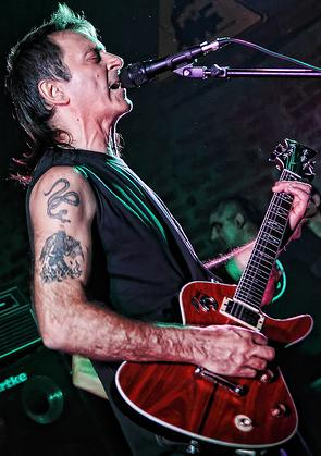 Claudio "Tano" Marciello, guitarrista de Almafuerte.